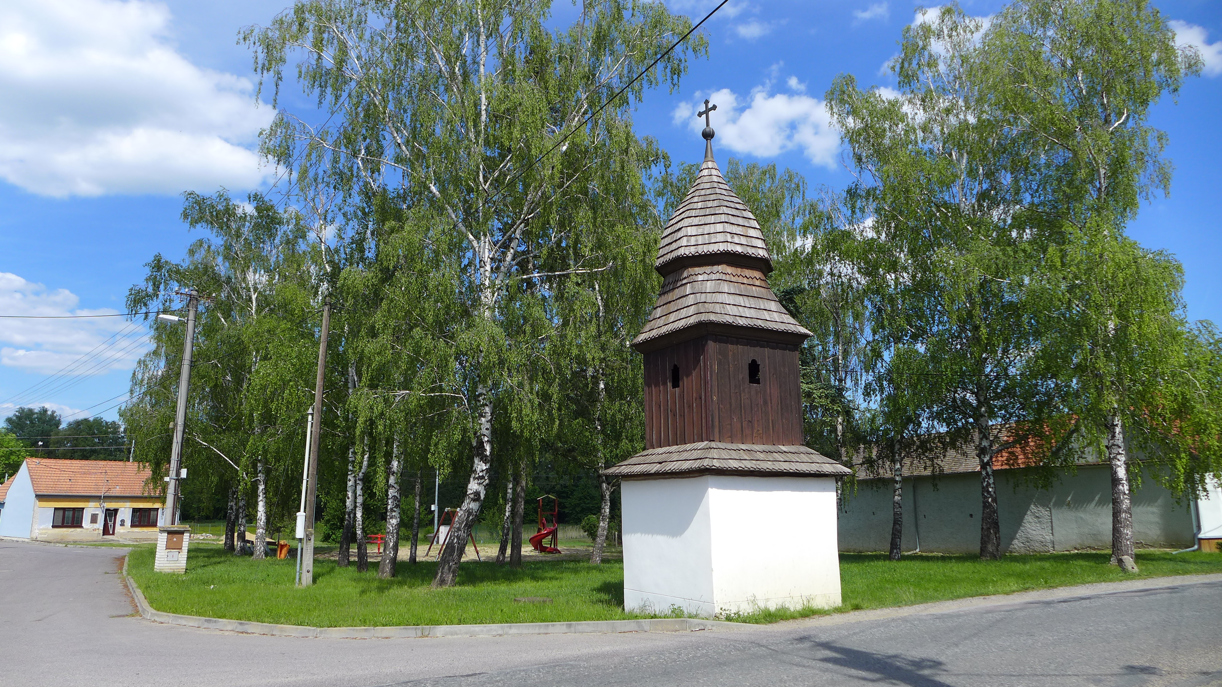 Zvonice, náves, Chlupice.